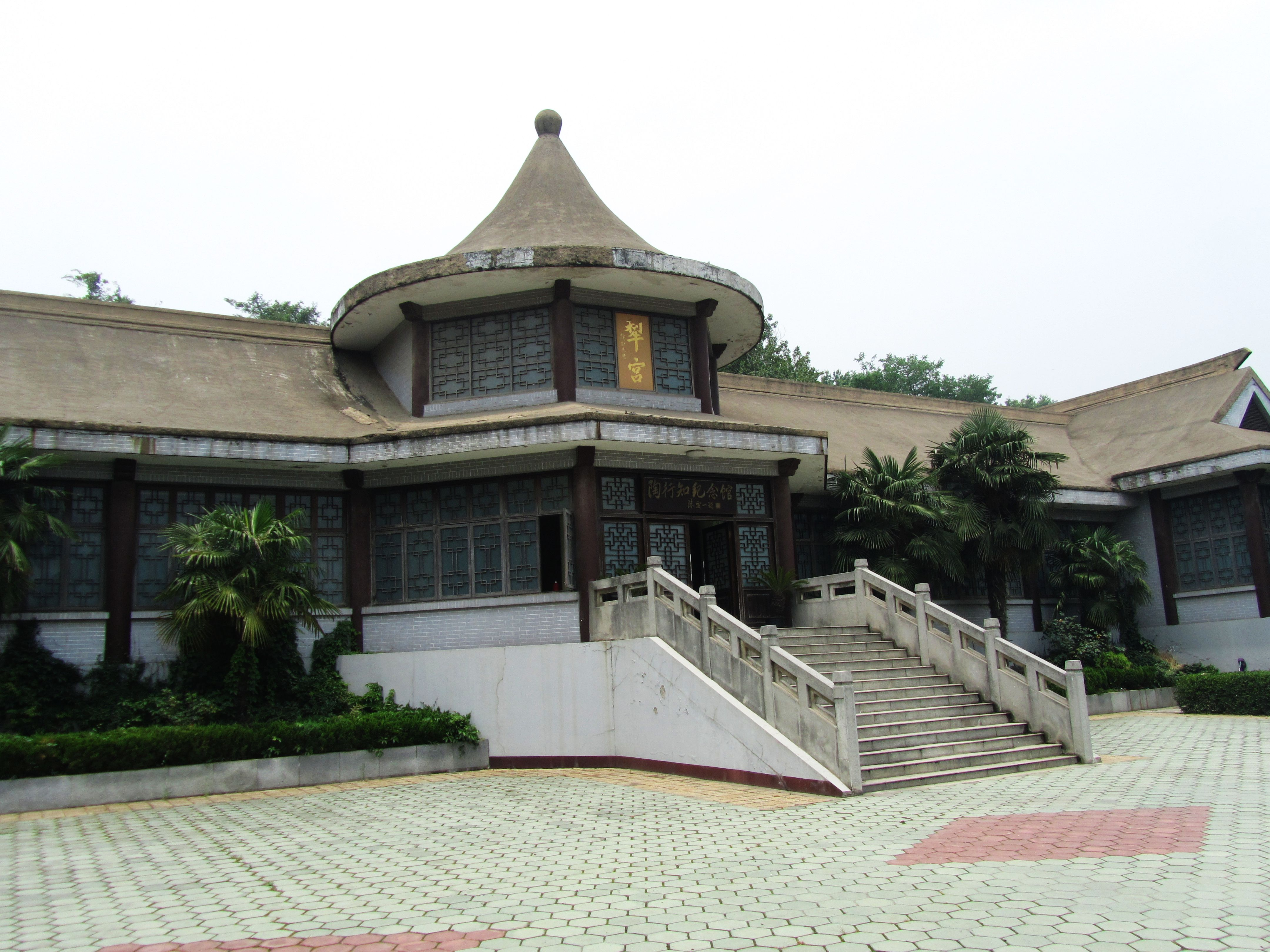 南京晓庄陶行知纪念馆。